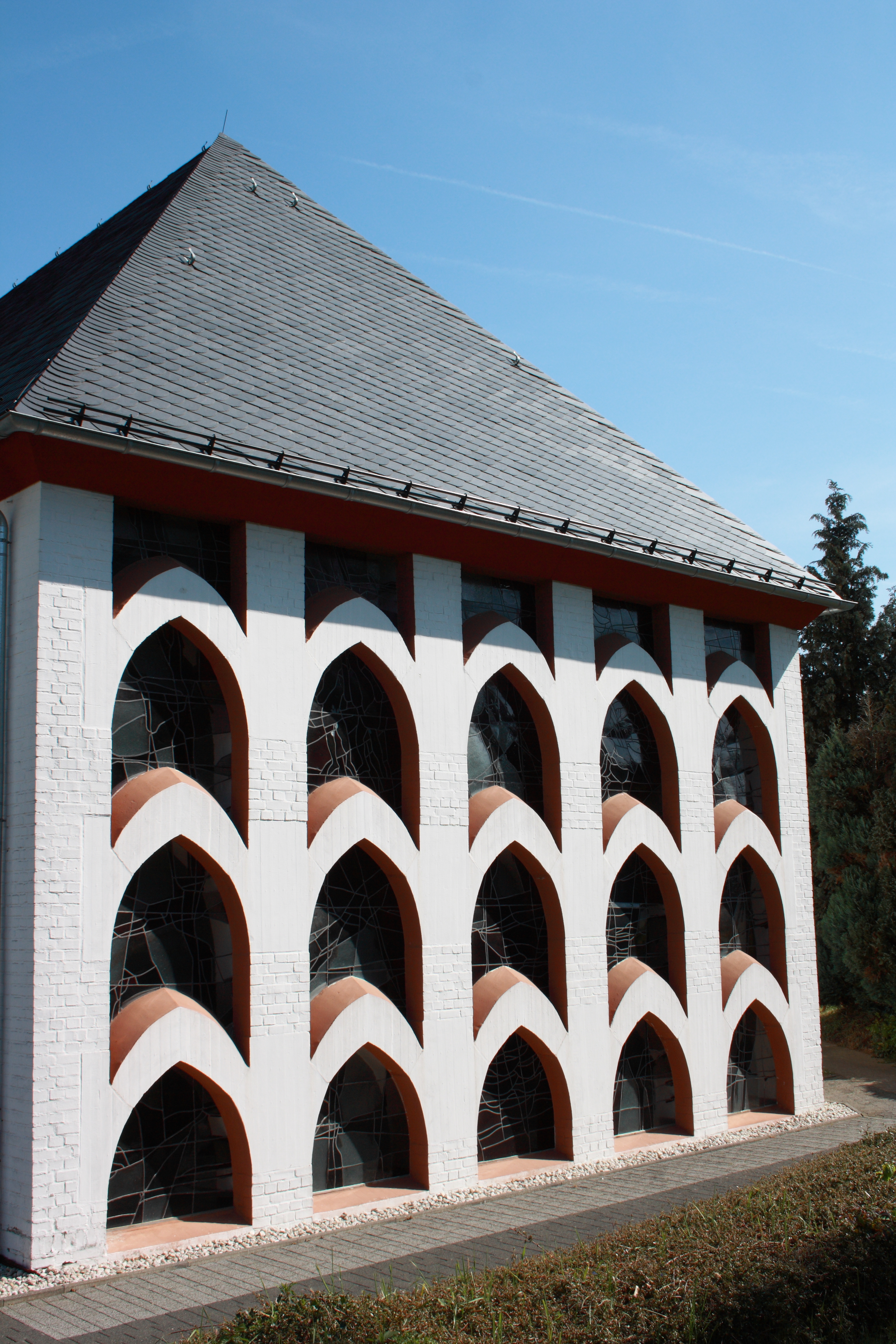 katholische Pfarrkirche St. Vinzenz in Kelberg